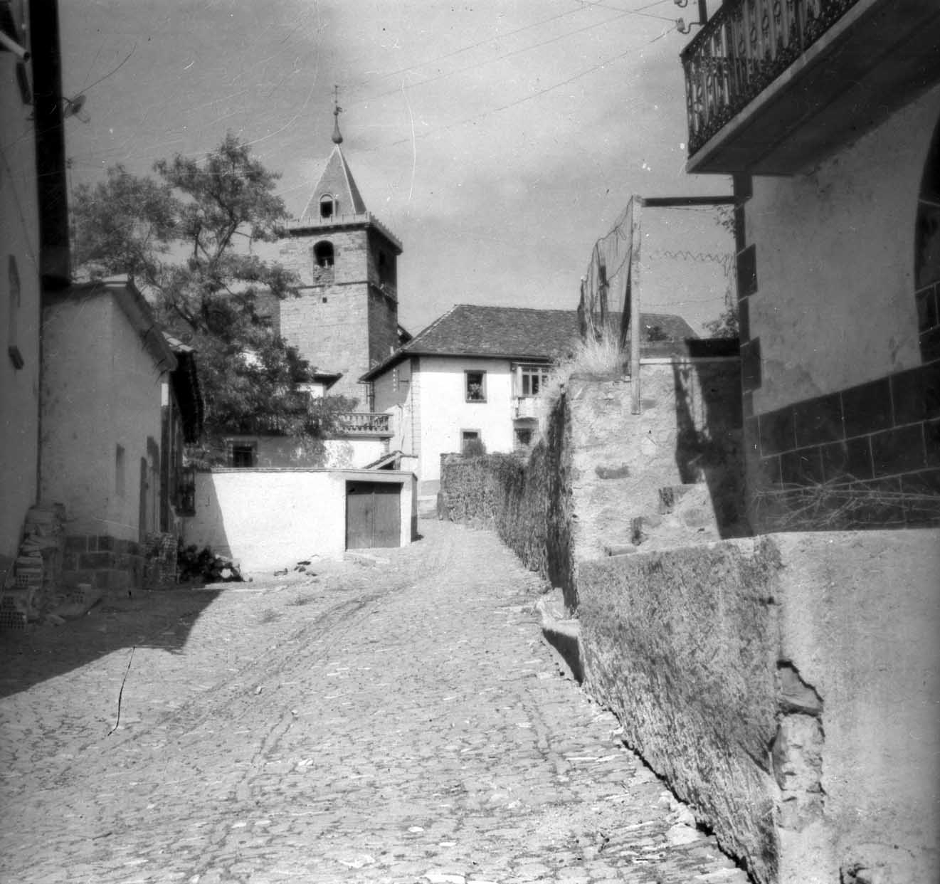 Elizaren ikuspegia.